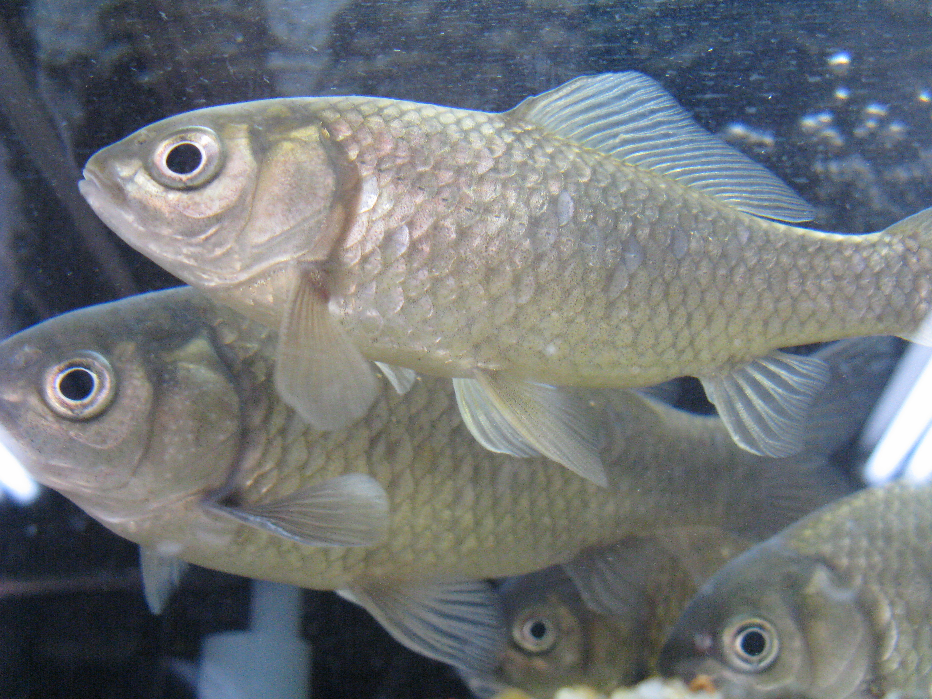 Scientific name Carassius auratus grandoculis